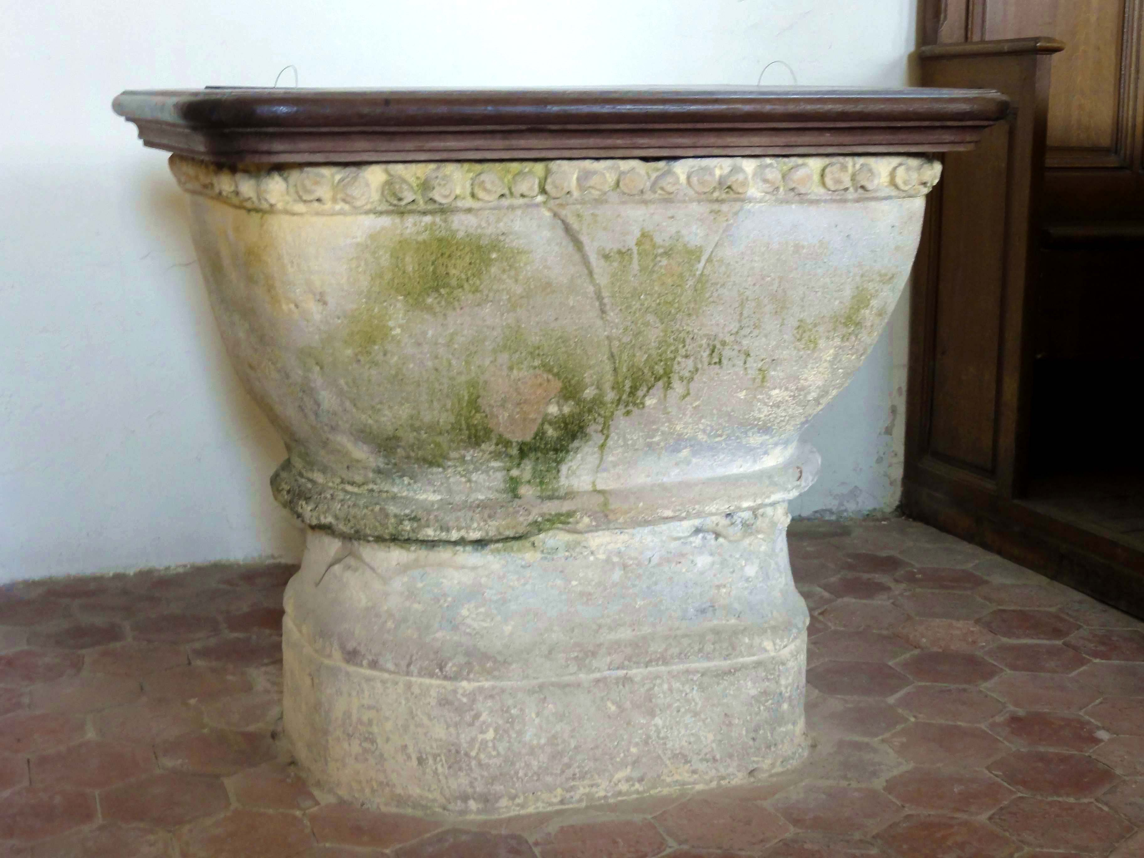 Mobilier de l'église - voir titre.